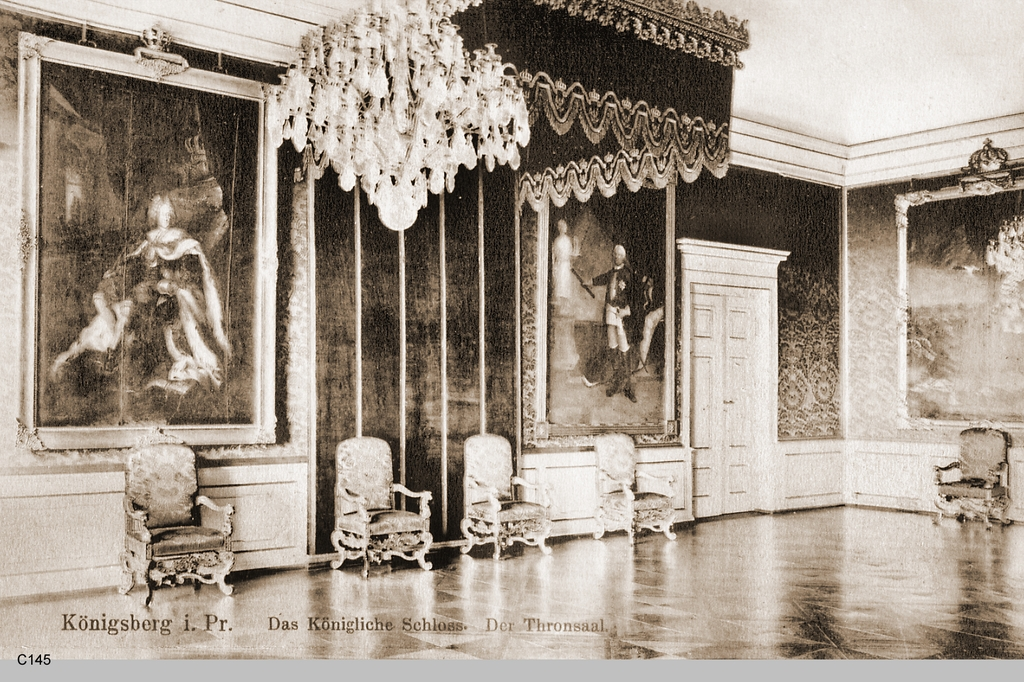 Tronsaal des Unfriedflügel des Königberger Schlosses